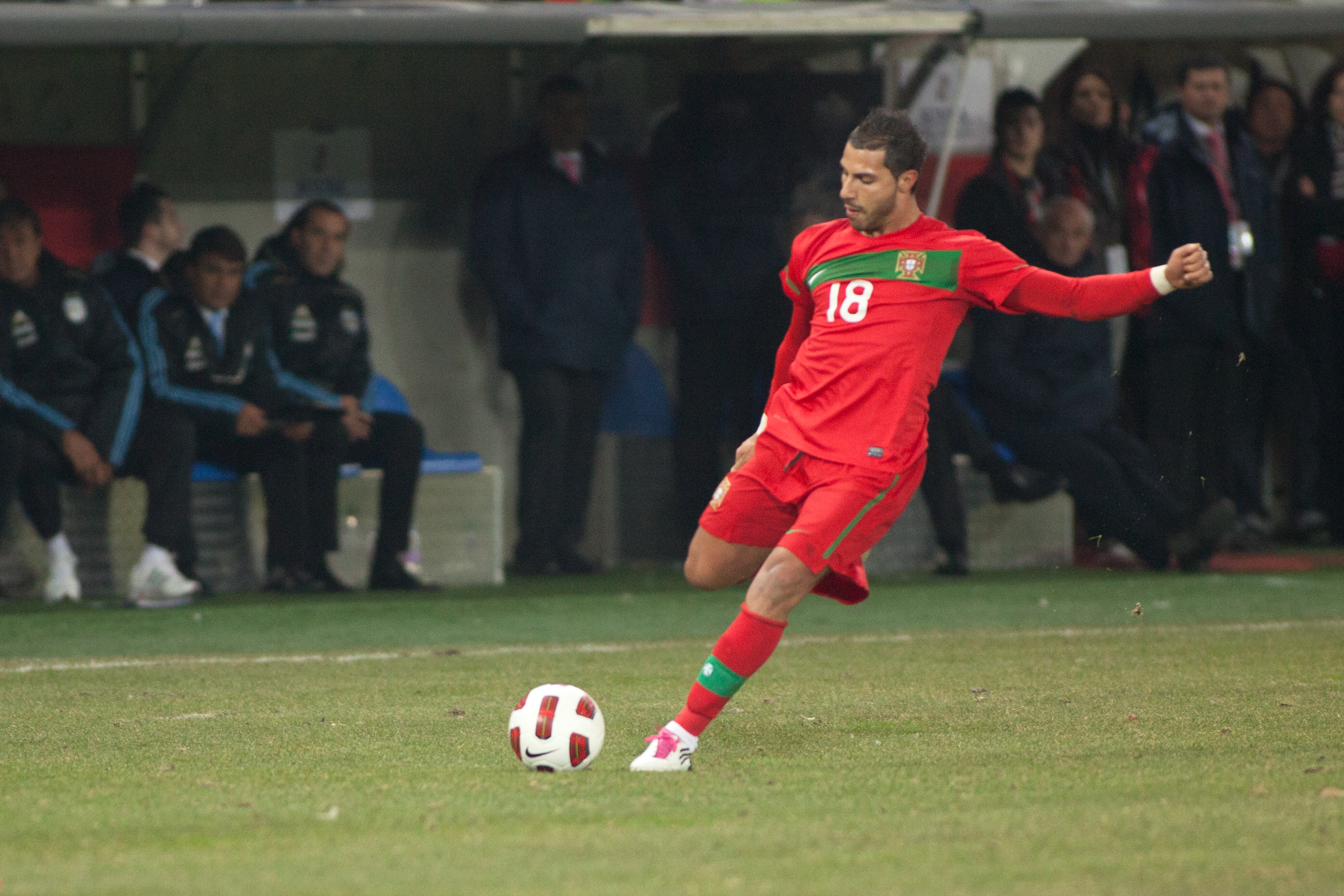 Ricardo Quaresma lors d'un match amical Portugal-Argentine à Genève.